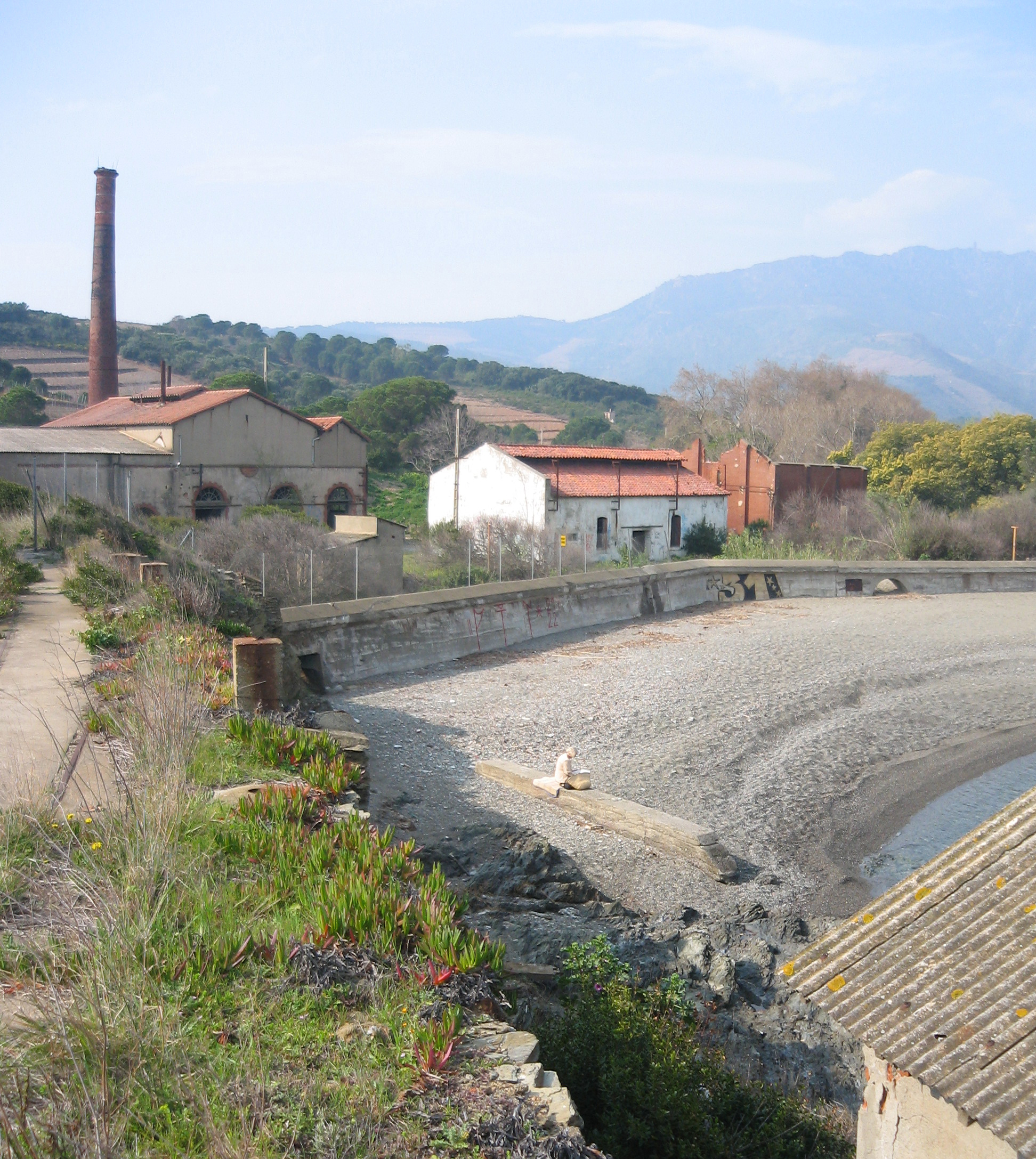 Anse de Paulilles - une petite partie de l'ancienne usine d'explosifs